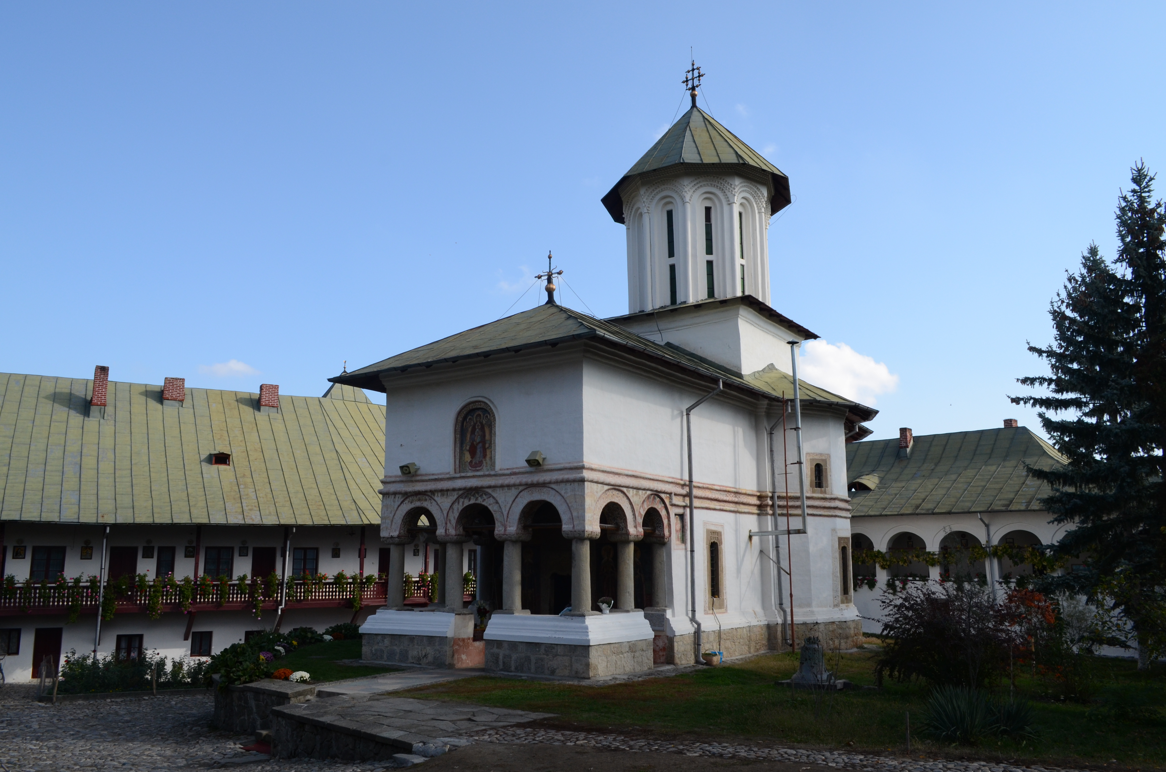 Biserica "Adormirea Maicii Domnului", Mănăstirea Govora